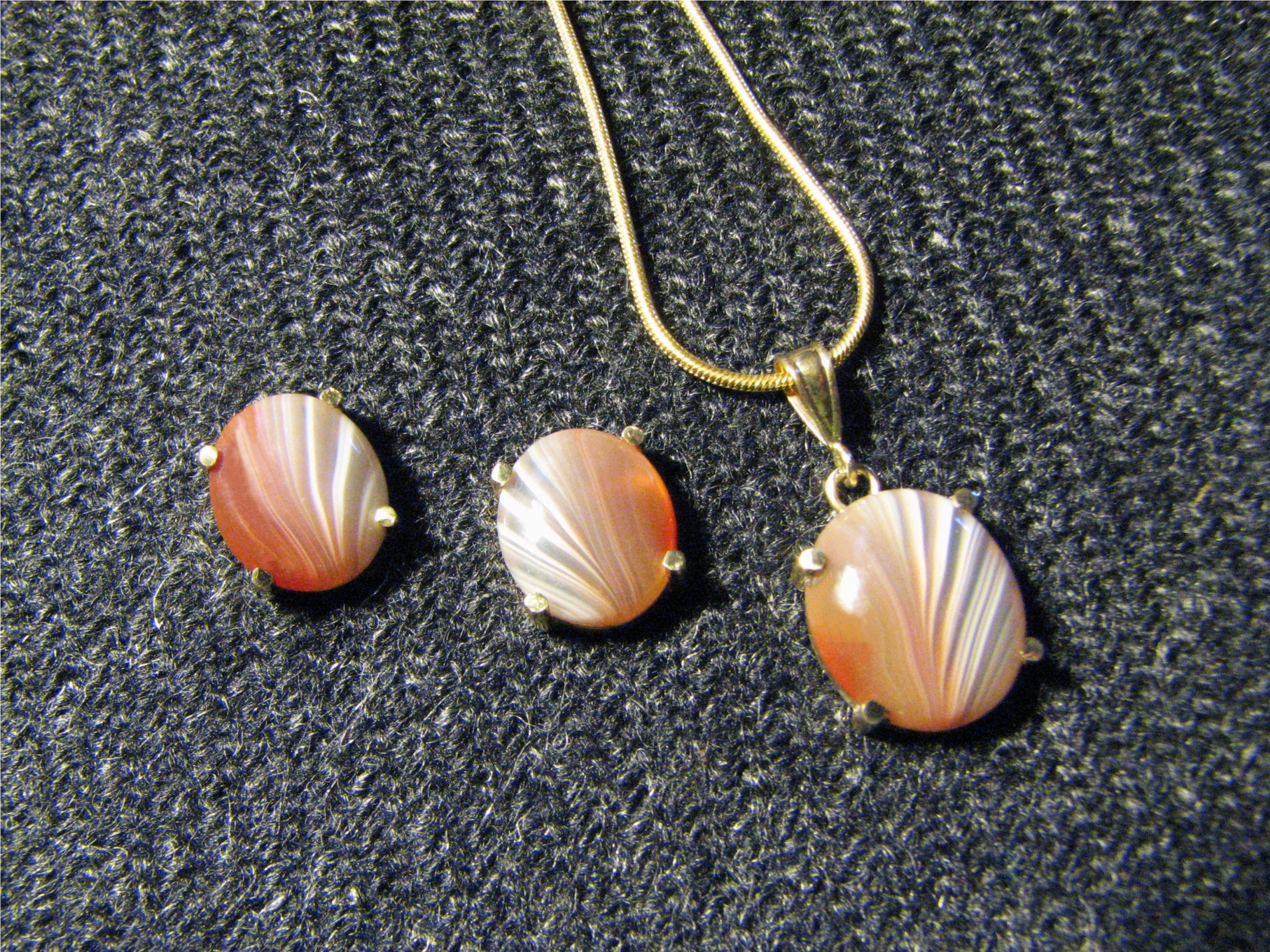 Zdjęcie przedstawiające biżuterię z agatem English | Polski | +/−